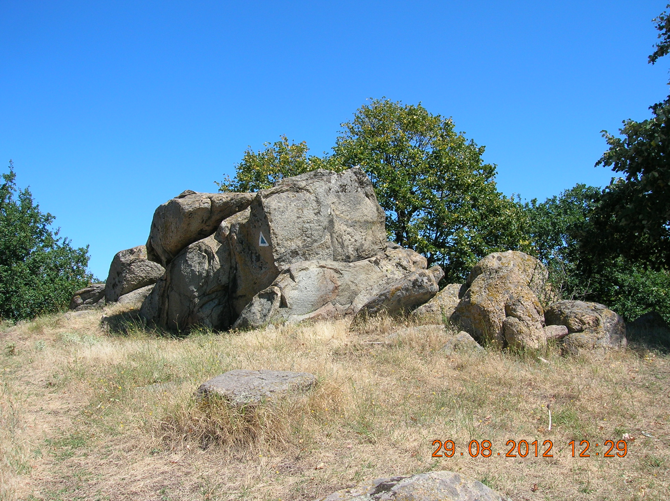 Parcul Naţional Munţii Măcinului, Vârful Ţuţuiatu